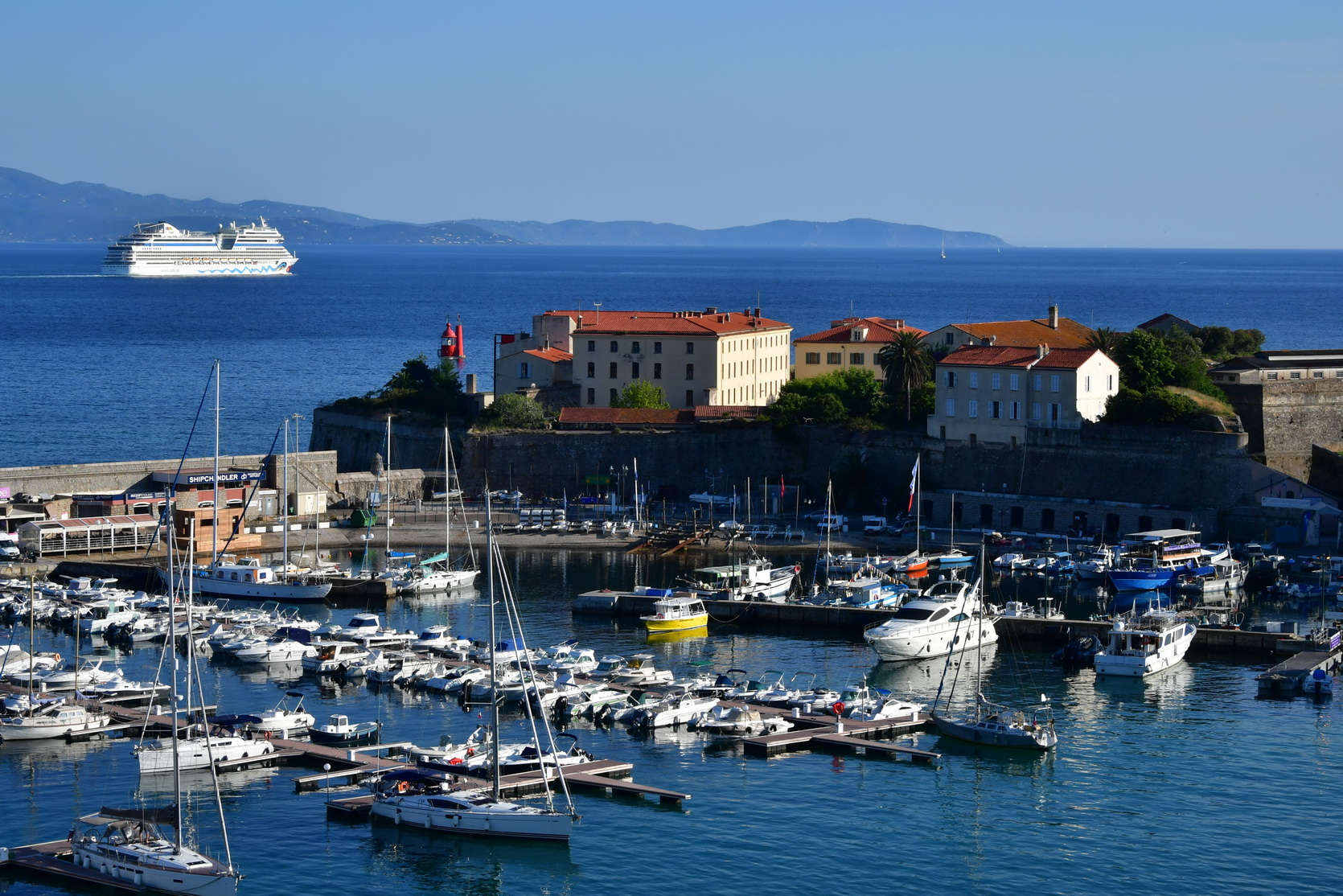 Ajaccio, Hafen